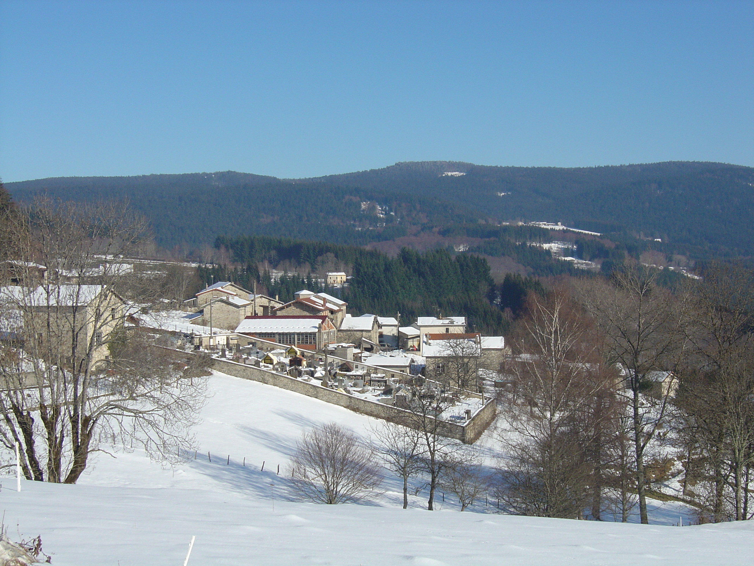 Vue générale de La Renaudie